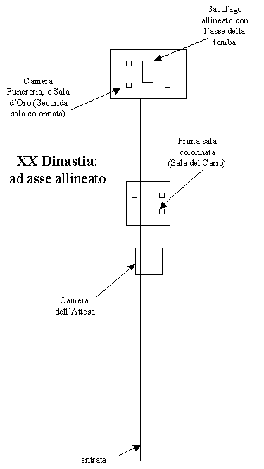 autore: Hotepibre (Giuseppe); tipologia: disegno; località e data: - - ; soggetto: schema planimetrico di tomba, ad asse allineato, della XX Dinastia della Valle dei Re; prodotto utilizzato per la realizzazione: Power Point.